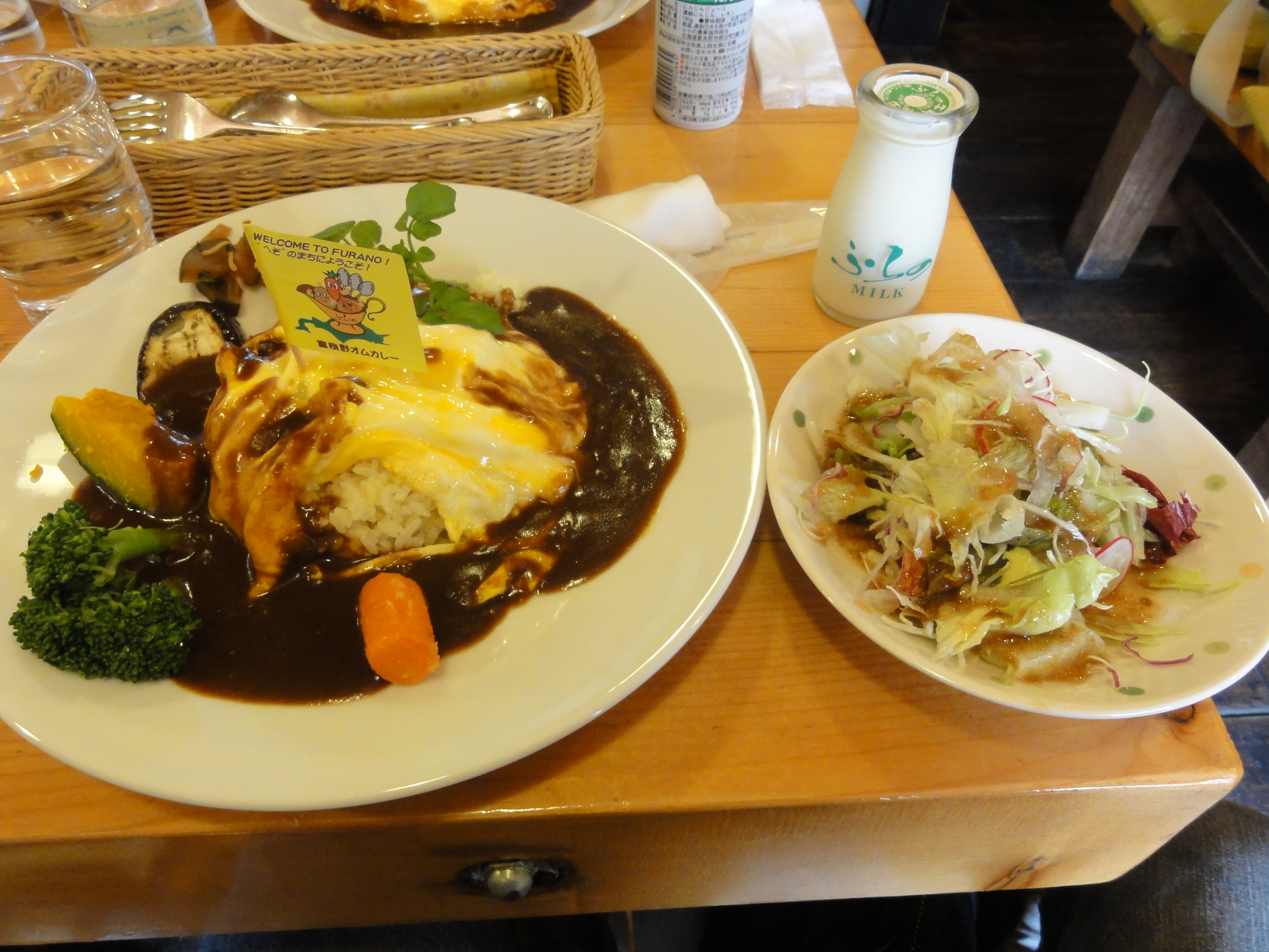 周囲の野菜がおいしかった